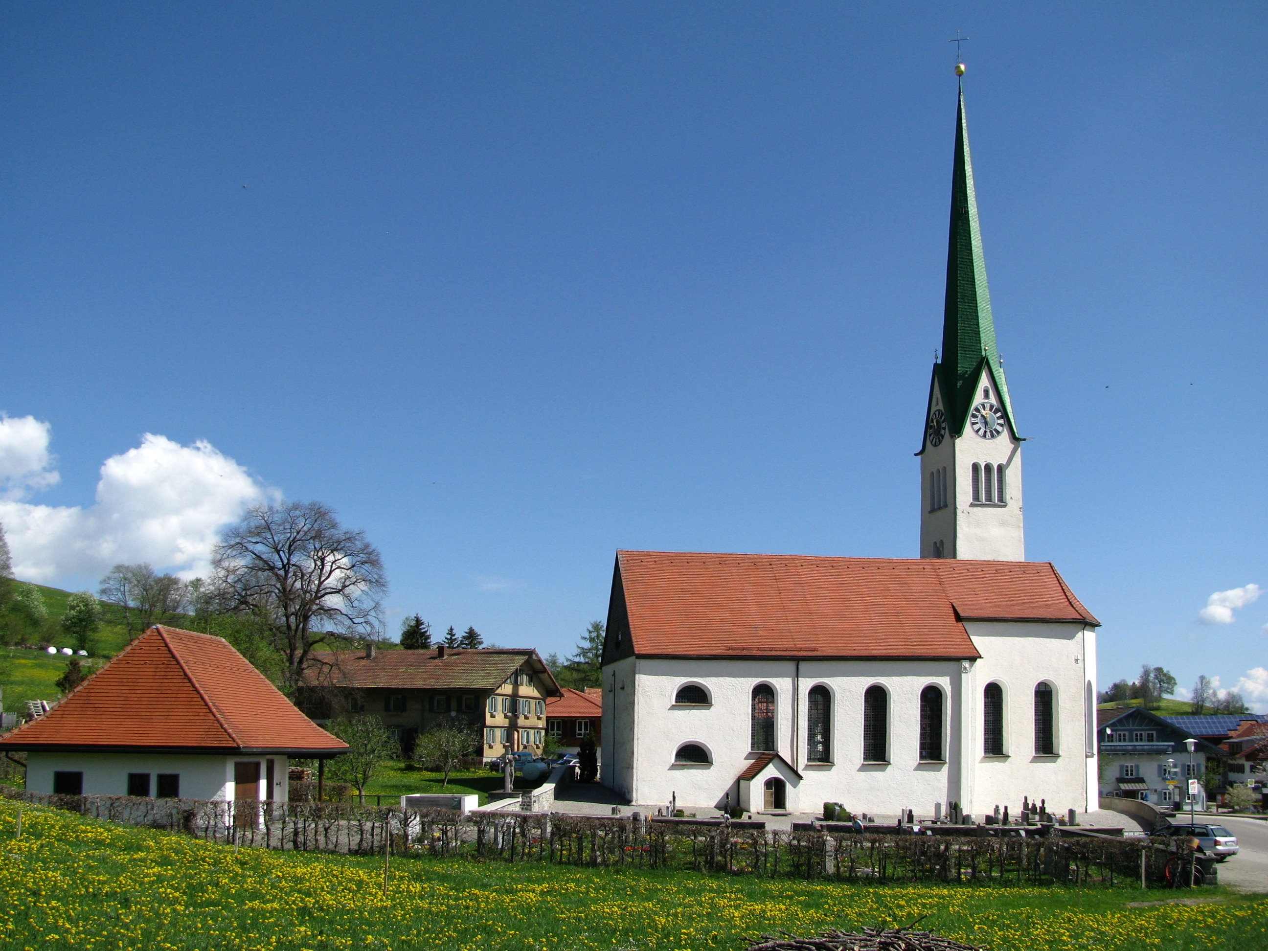 Pfarrkirche St. Blasius